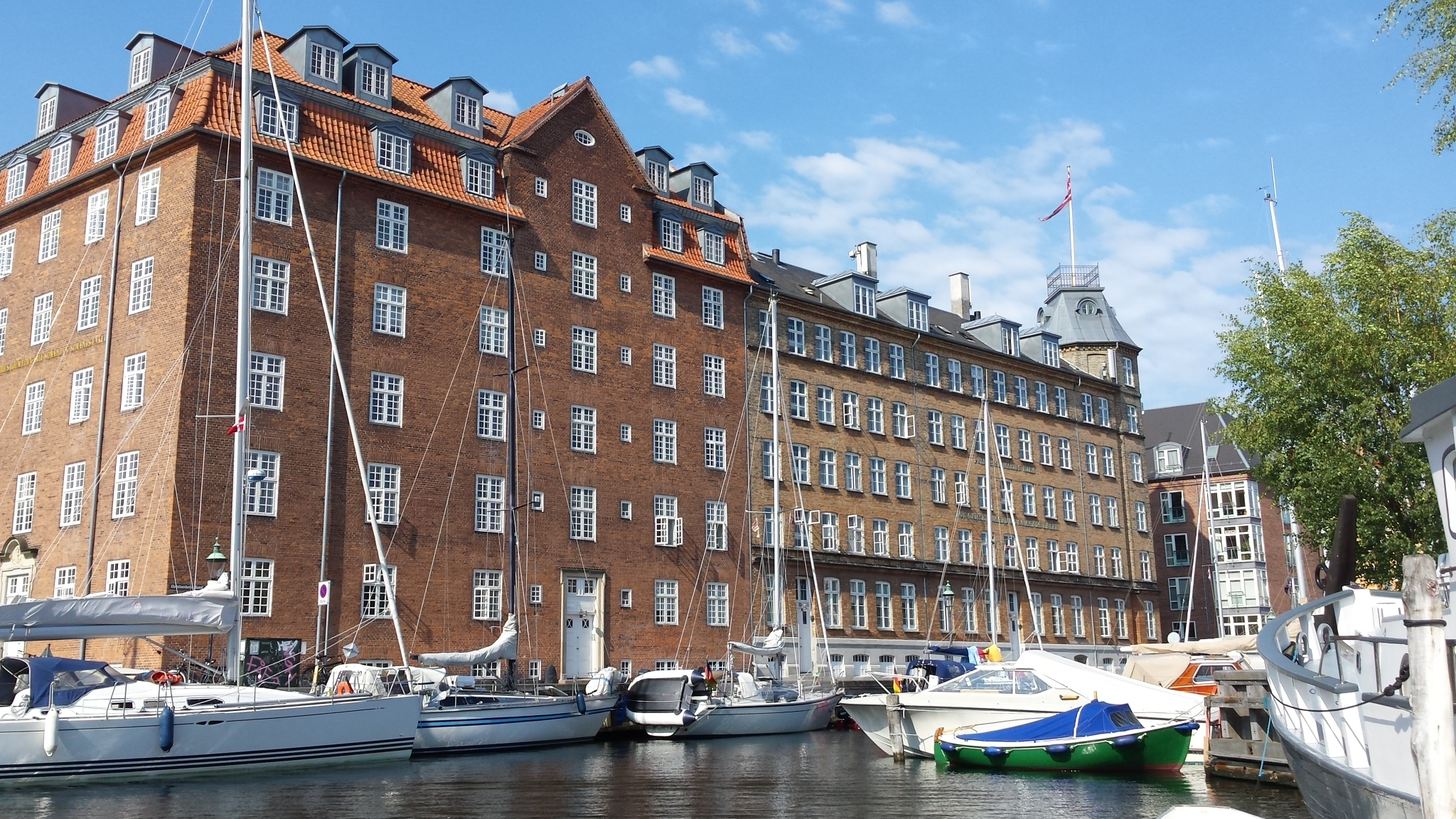 Prinsesse Maries Hjem for gamle Sømænd og Sømænds Enker in Christianshavn, Copenhagen, Denmark